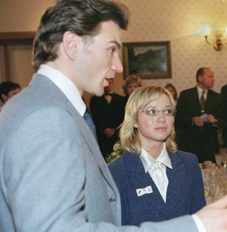 Антоном Сихарулидзе